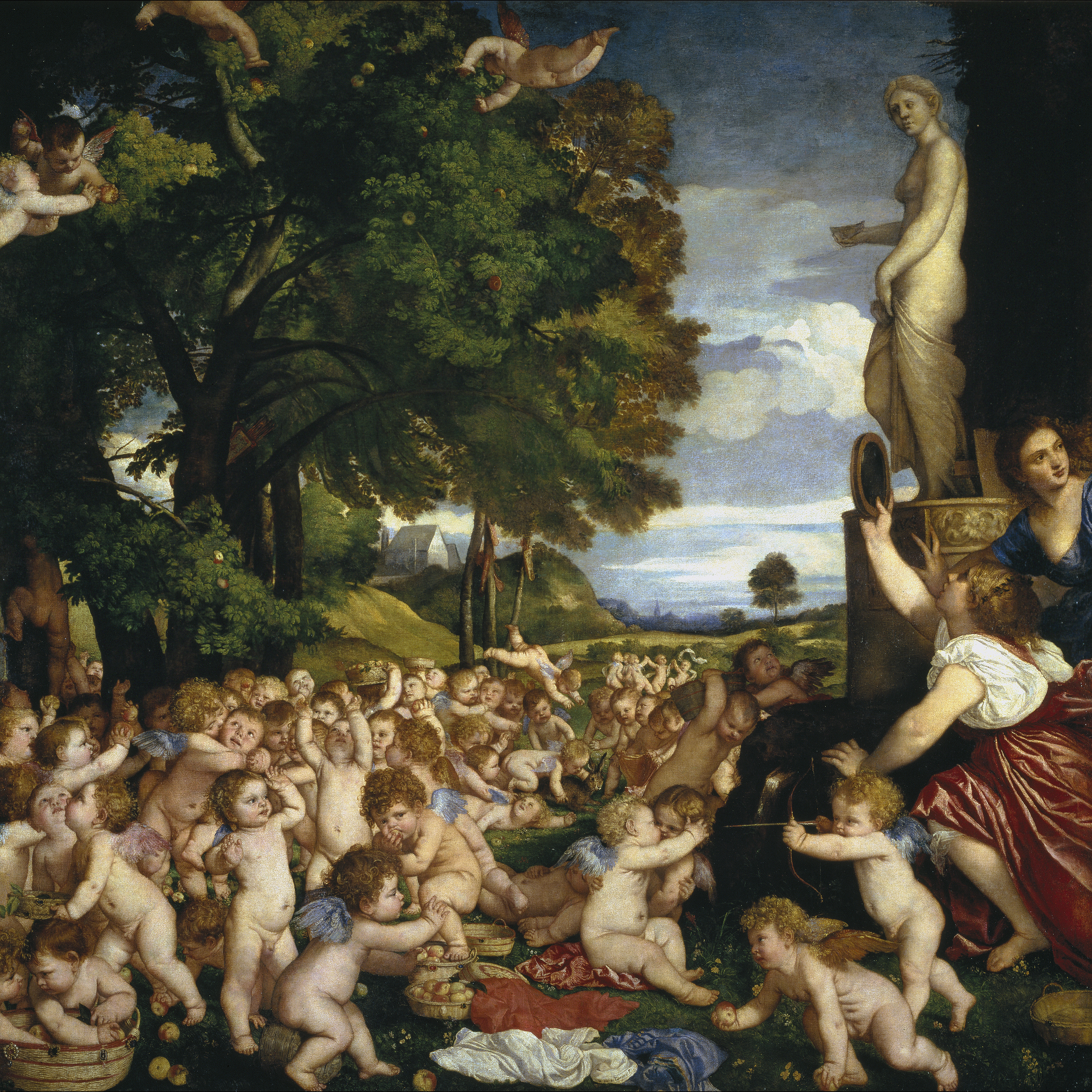 La obra, titulada Ofrenda a Venus, es uno de los lienzos de Tiziano que se conservan en el Museo del Prado.